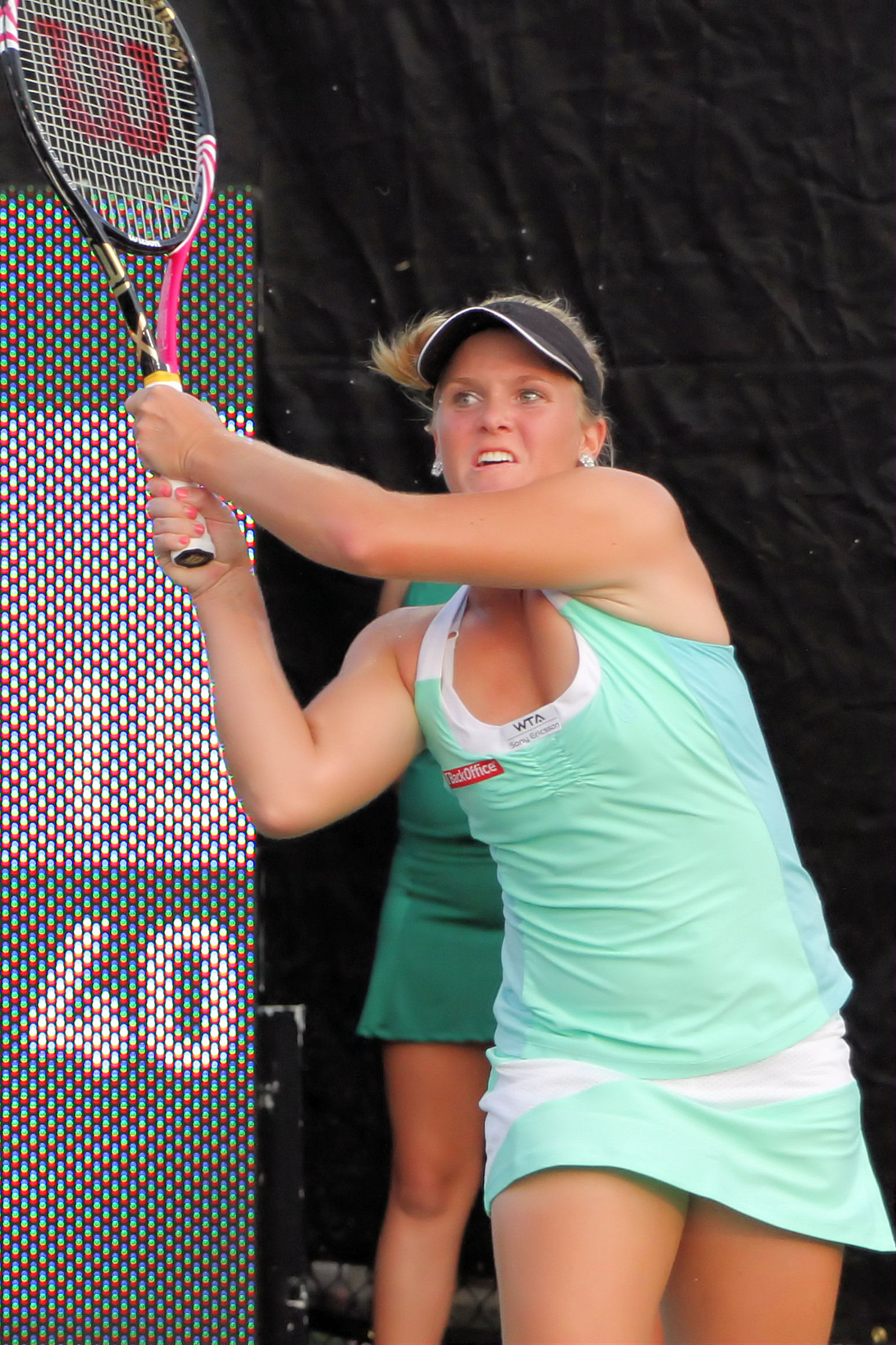 Melanie Oudin (USA) 2011-08-24 Oudin vs Kerber